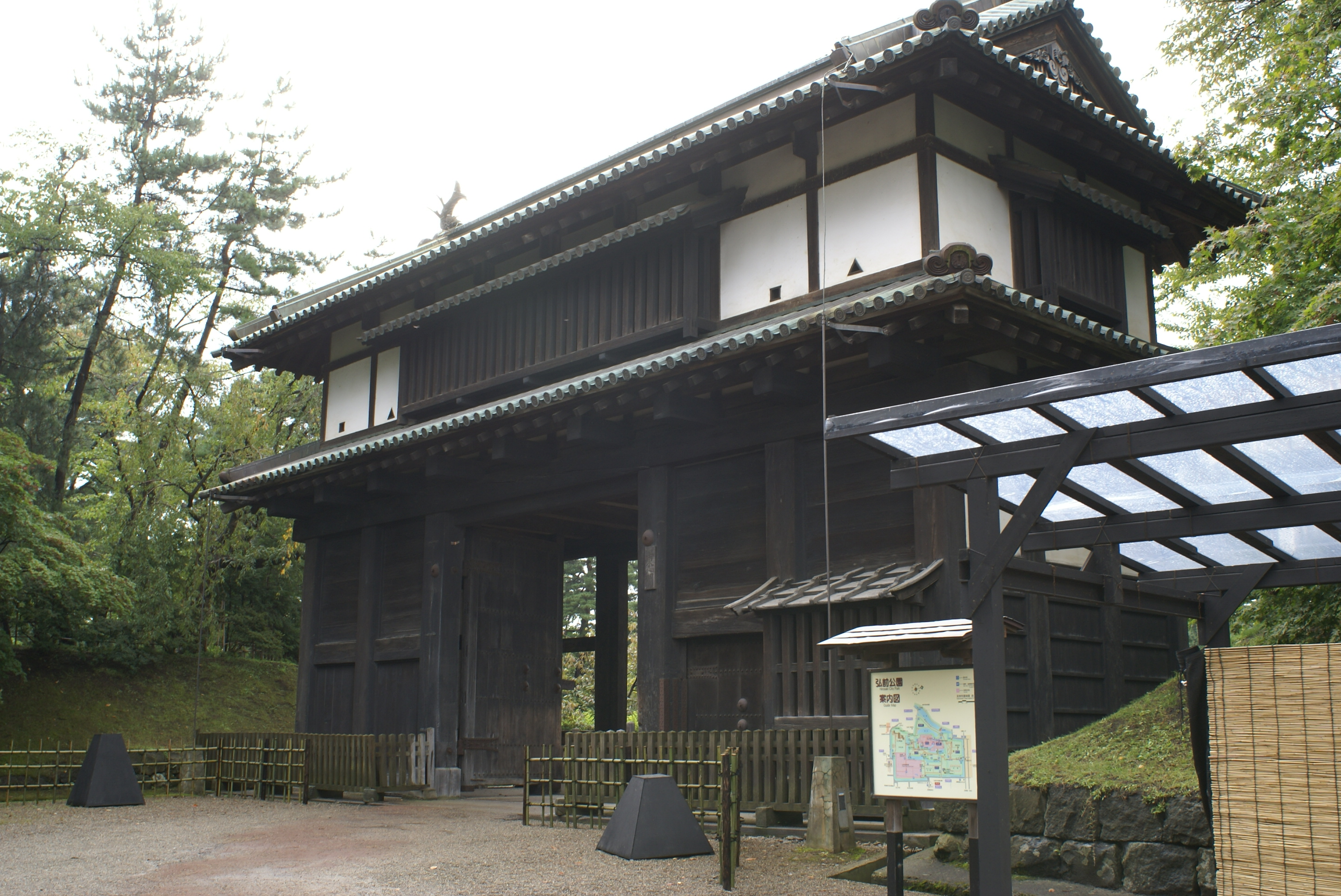 弘前城東門